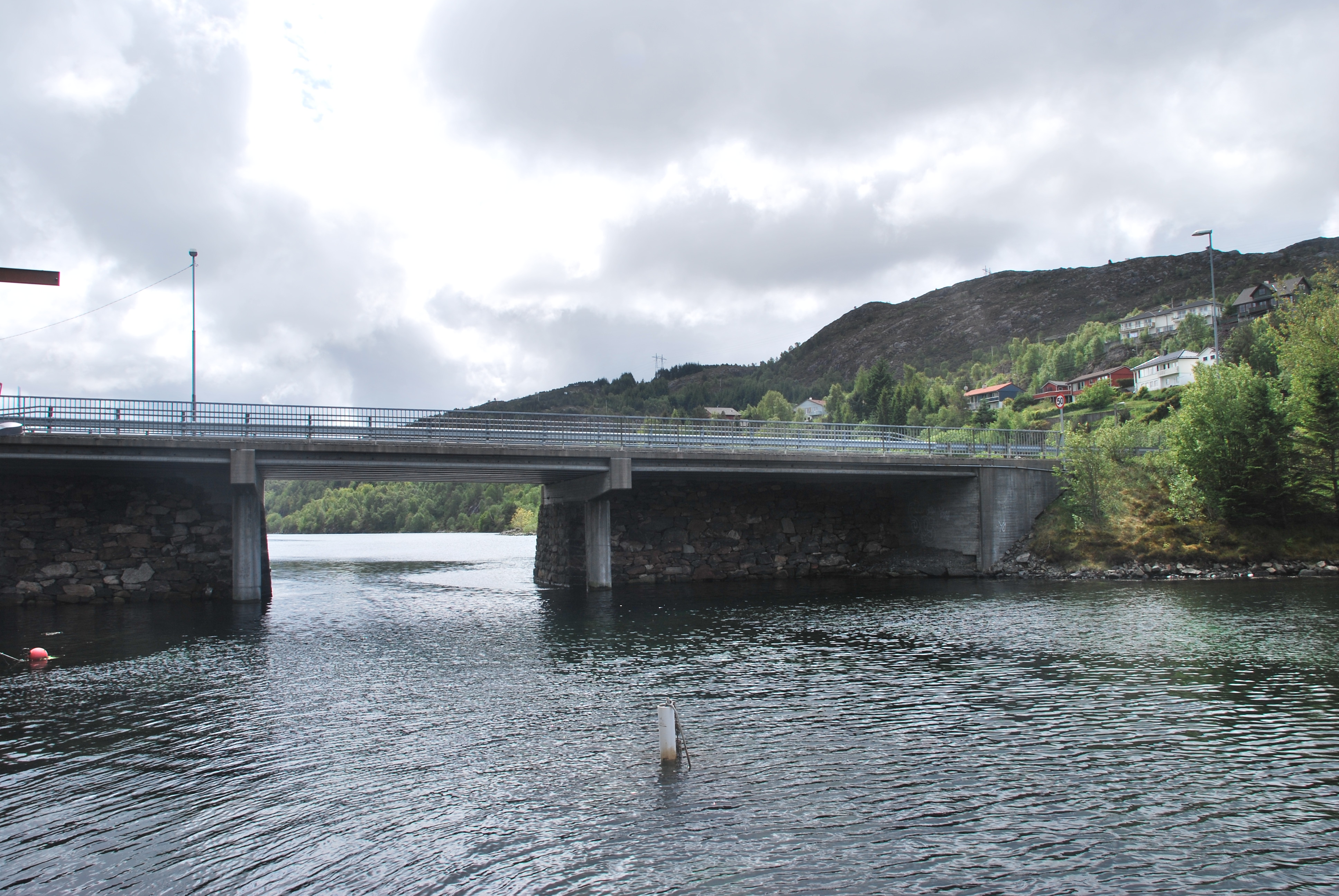 Gamle Bildøybro på Sotra utenfor Bergen.